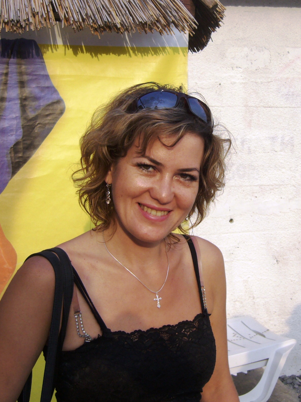 автор-виконавець